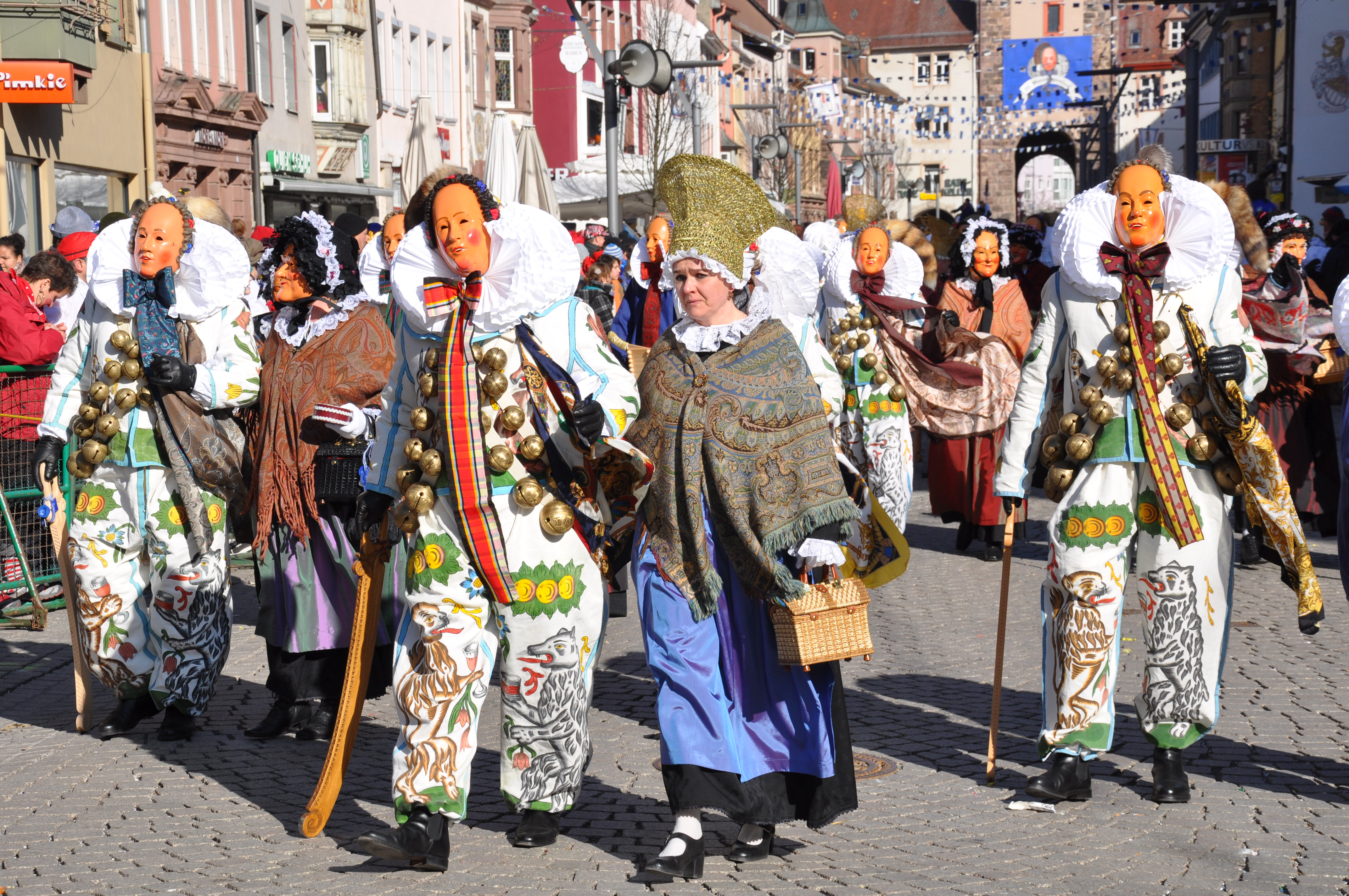 Historischer Umzug der Narrozunft Villingen, Fasnetsmontag 2011 Narros mit Morbel und Alt-Villingerin